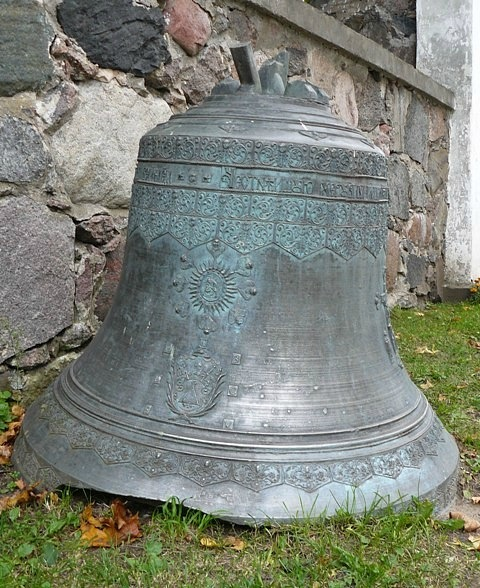 Колокол 1701 года возле костела св. Николая, Г. п. Свирь, Мядельский район, Минская область. Фото путешествия по Беларуси.